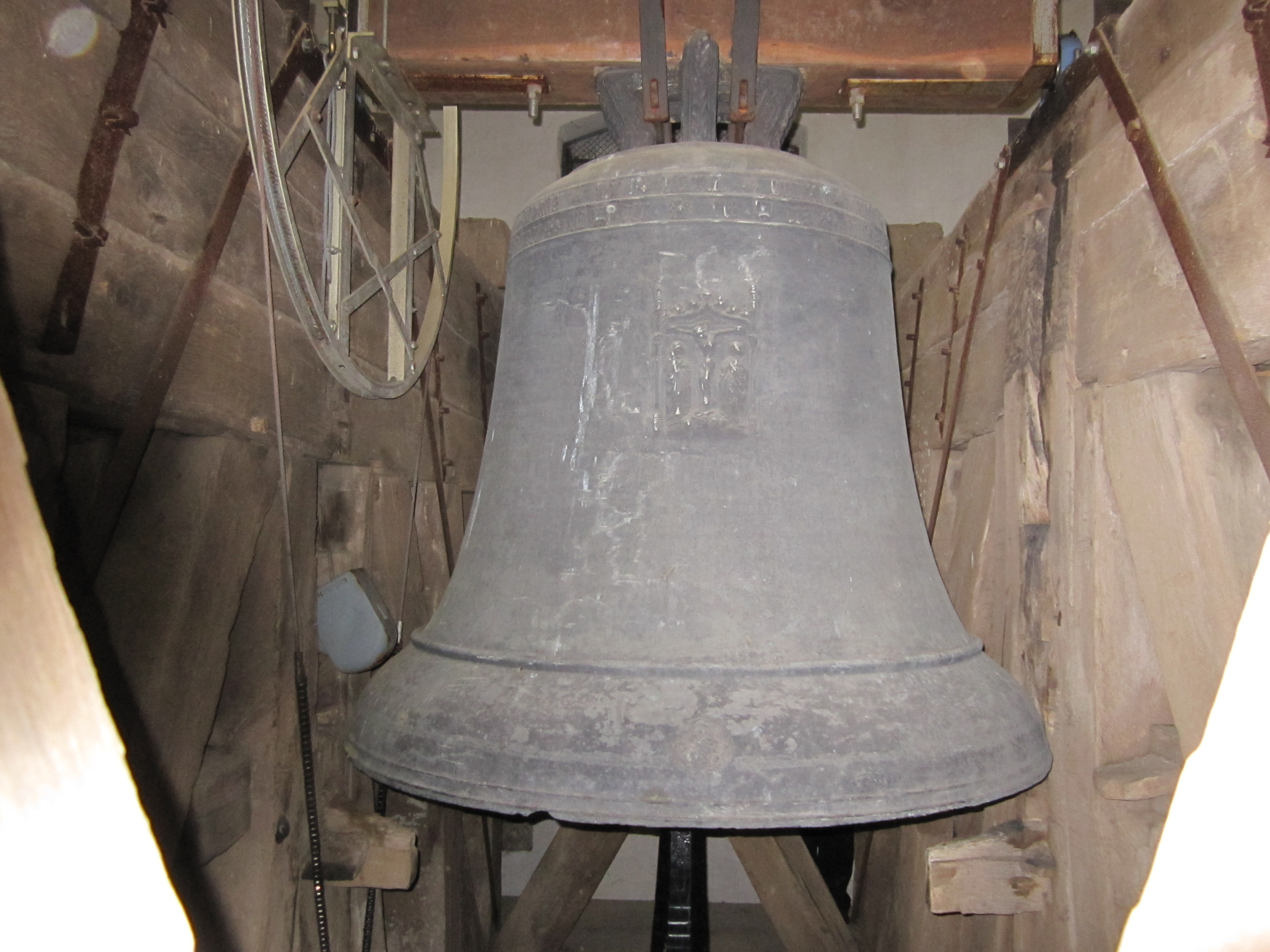 Die gotische Glocke des Münsters Obermarchtal